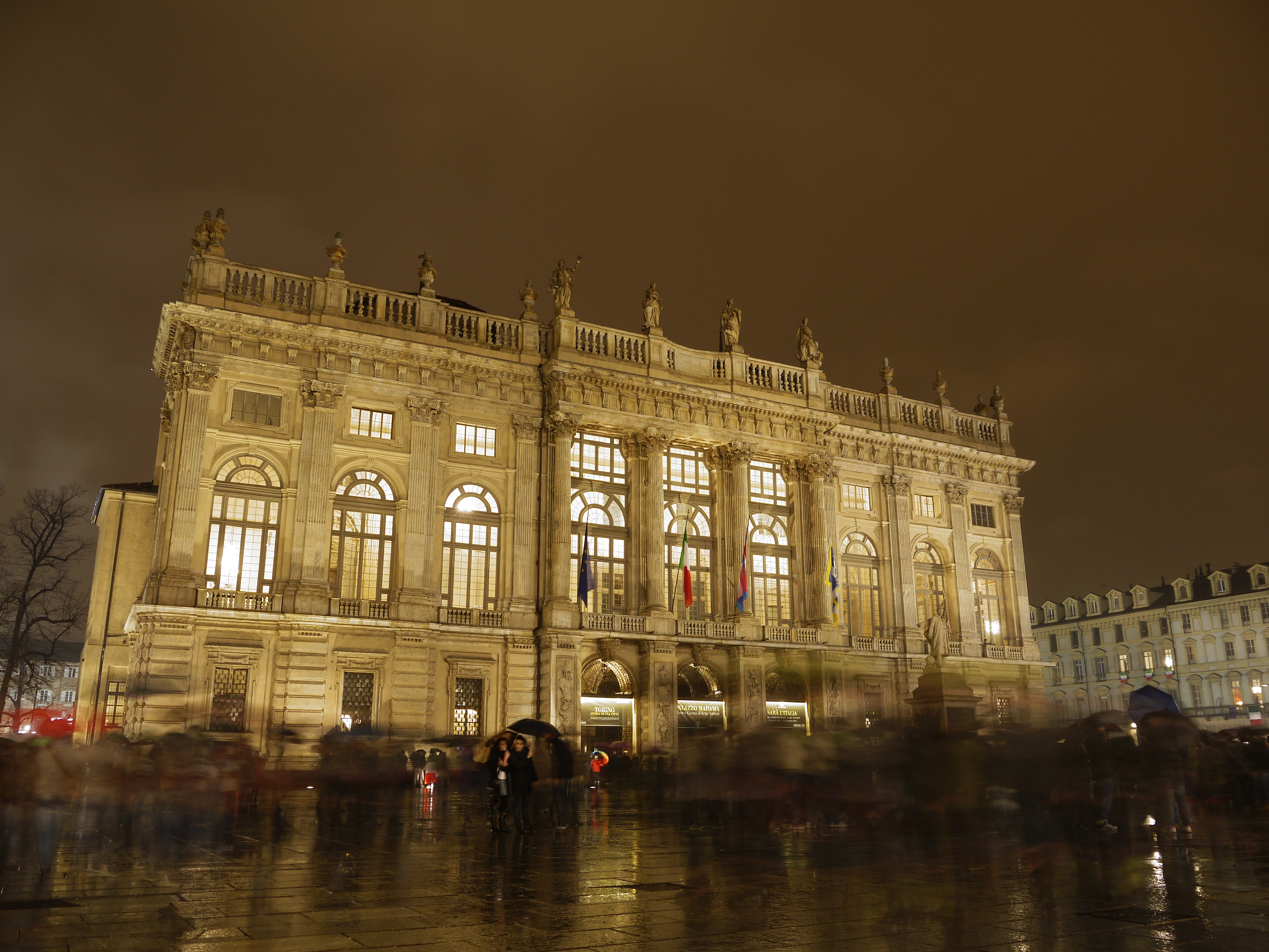 Palazzo Madama, Torino, festeggiamenti per i 150 anni dell'Unità d'Italia This is a photo of a monument which is part of cultural heritage of Italy.